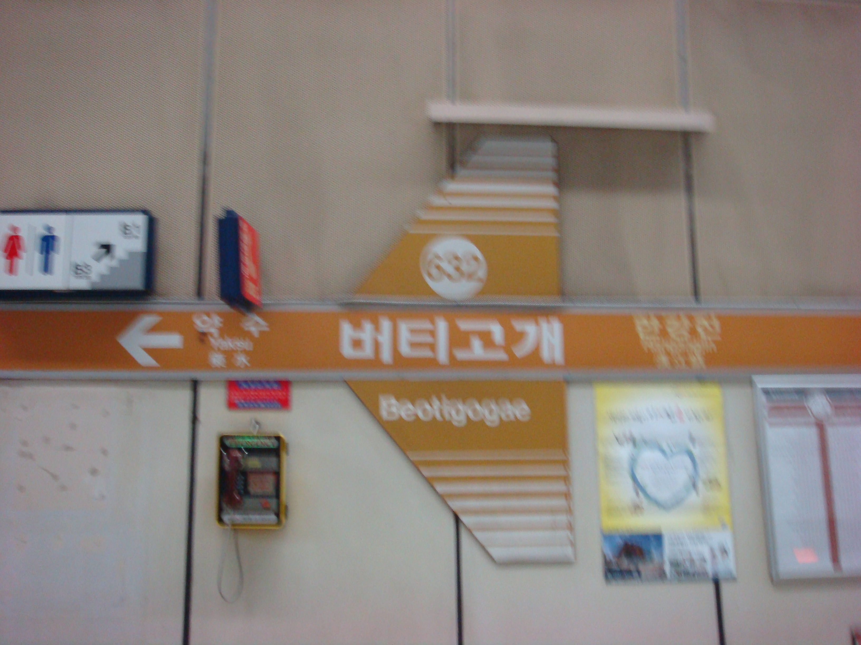 버티고개역 역명판